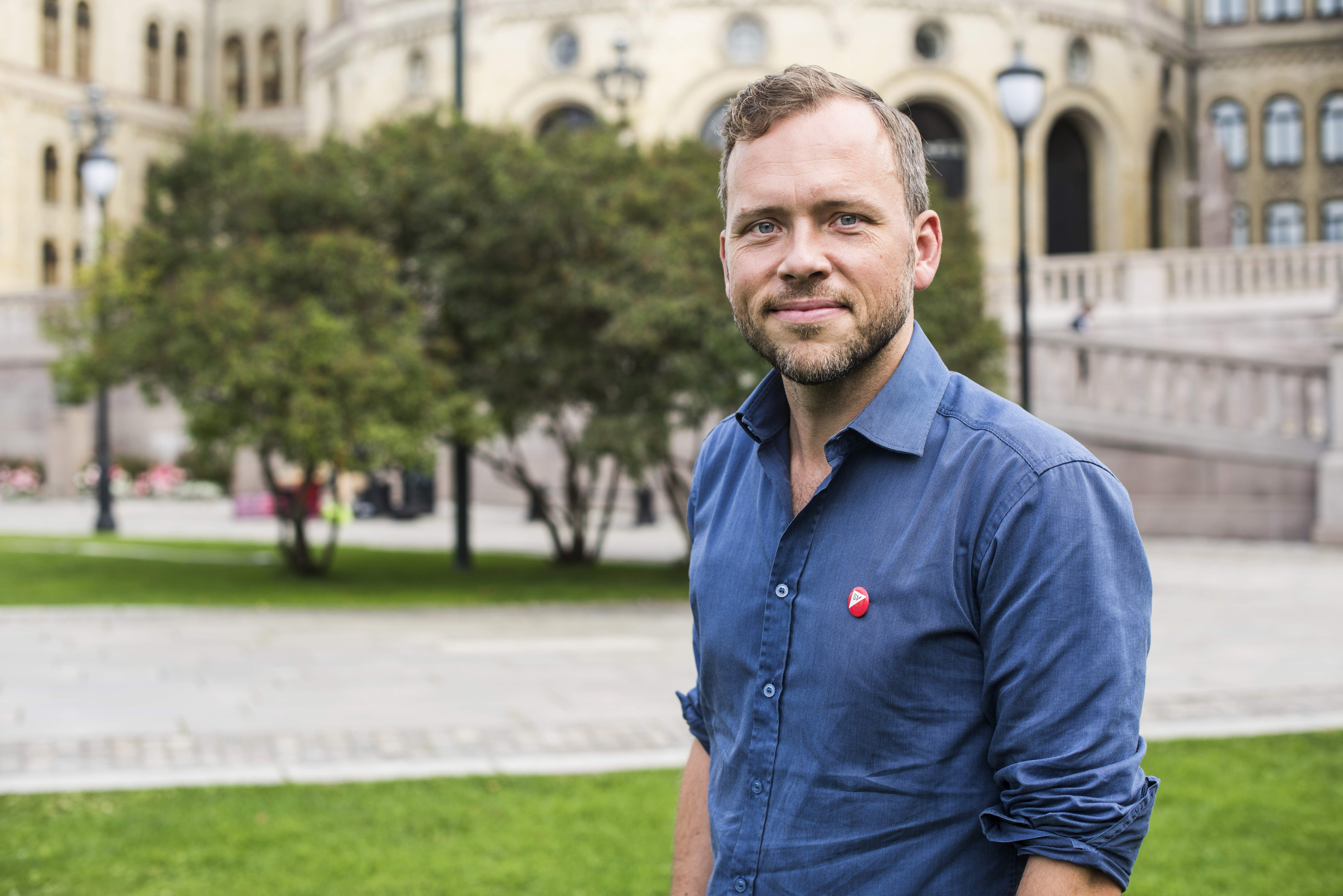 Audun Lysbakken